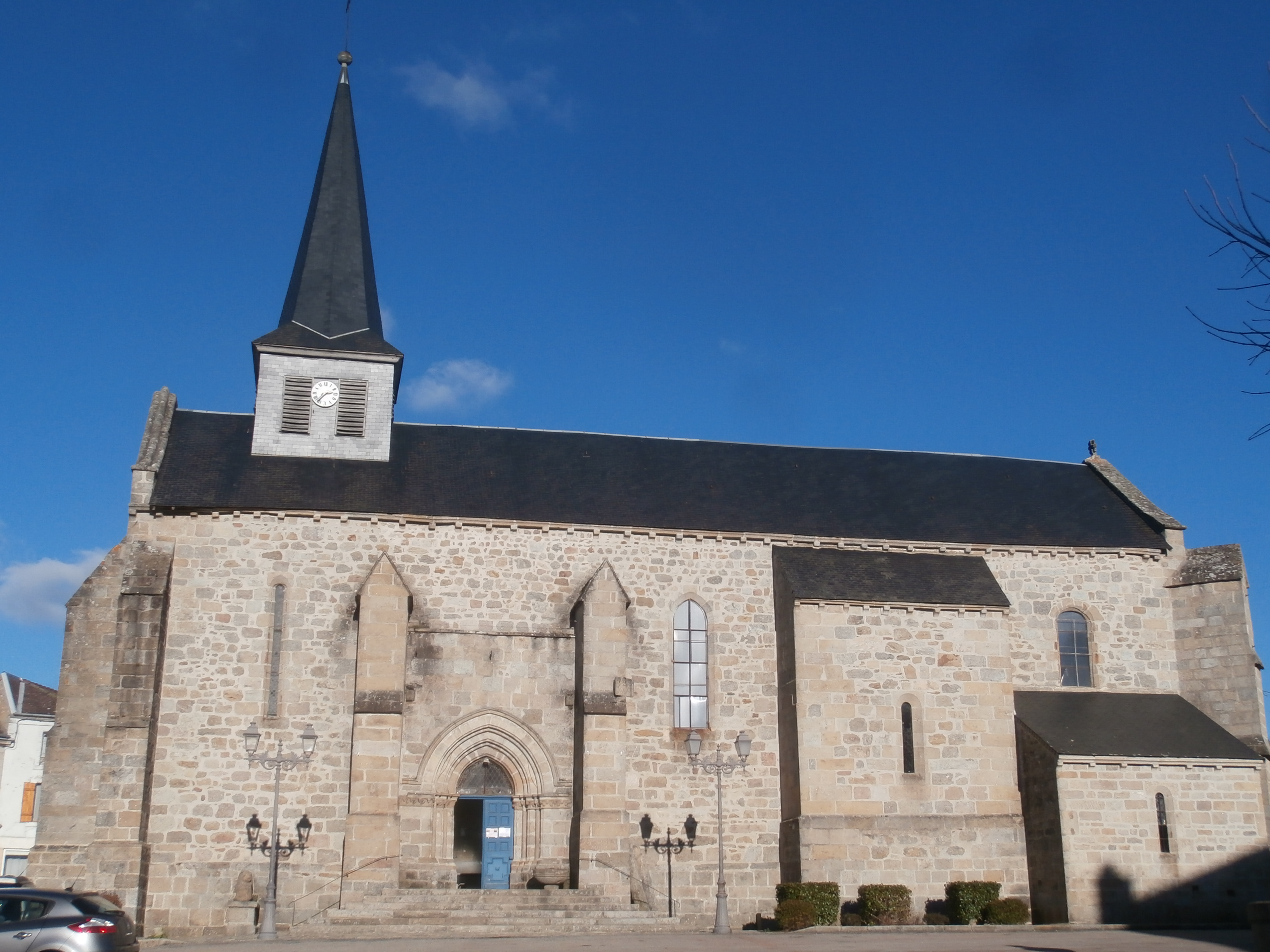 Eglise du XII - XV siècle de Vallière (Creuse- France)